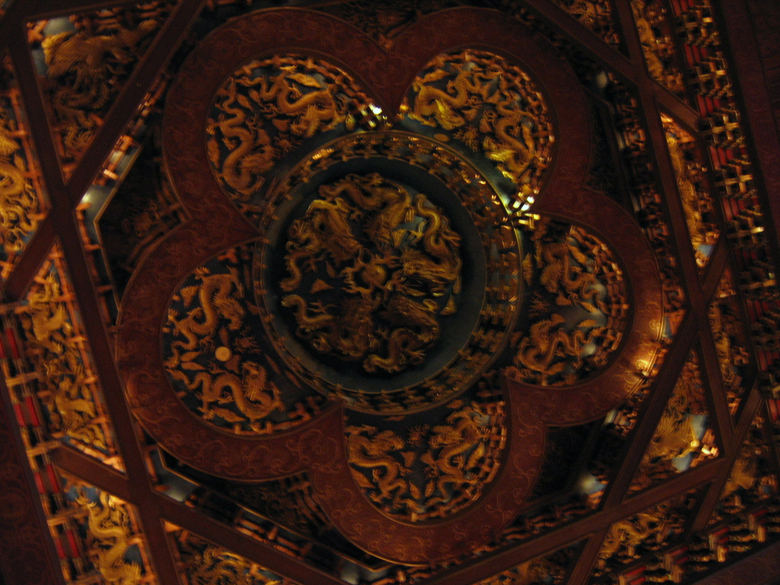 臺北圓山大飯店大廳梅花藻井。